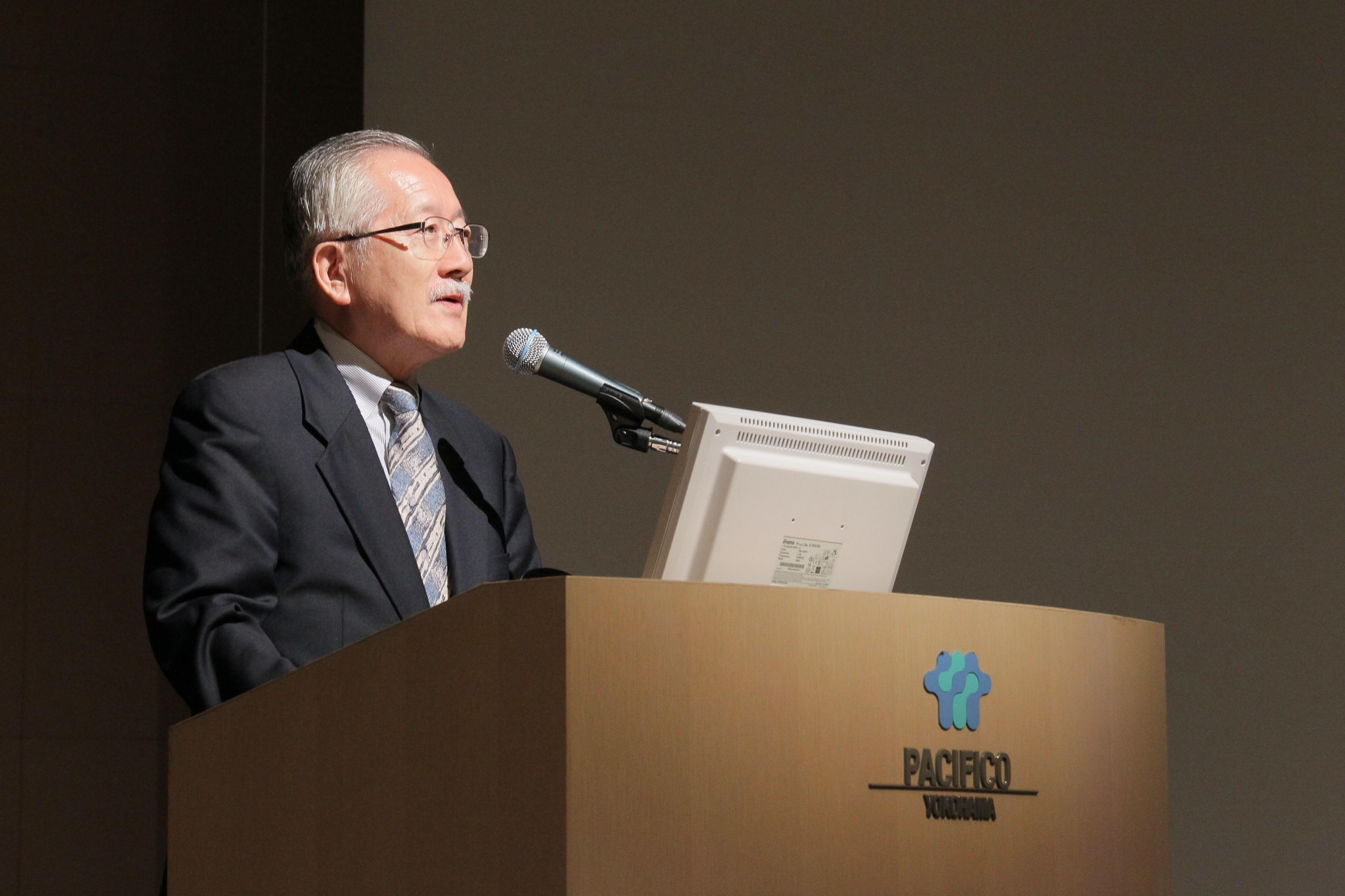 どの学会で講演したのかを忘れました。